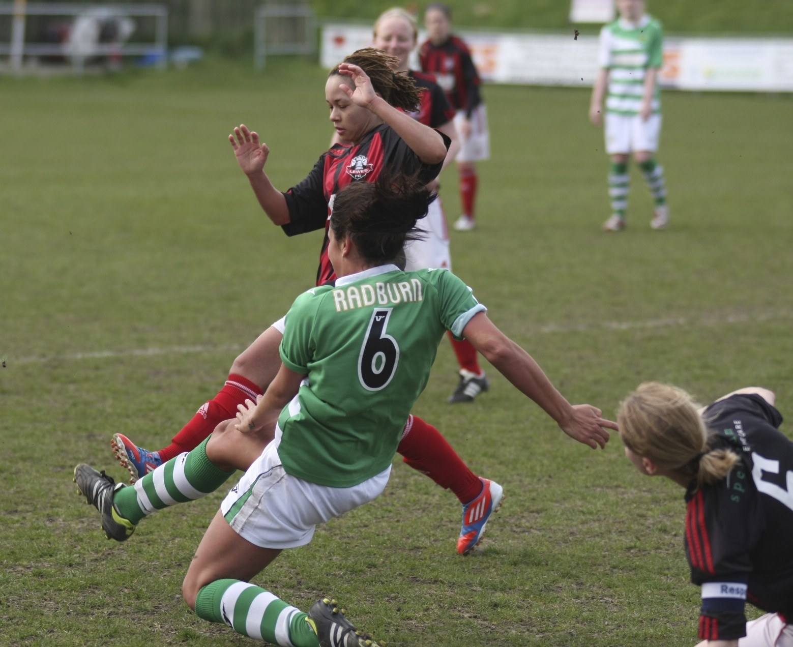 Lewes Ladies v Yeovil 21 4 2013 4850